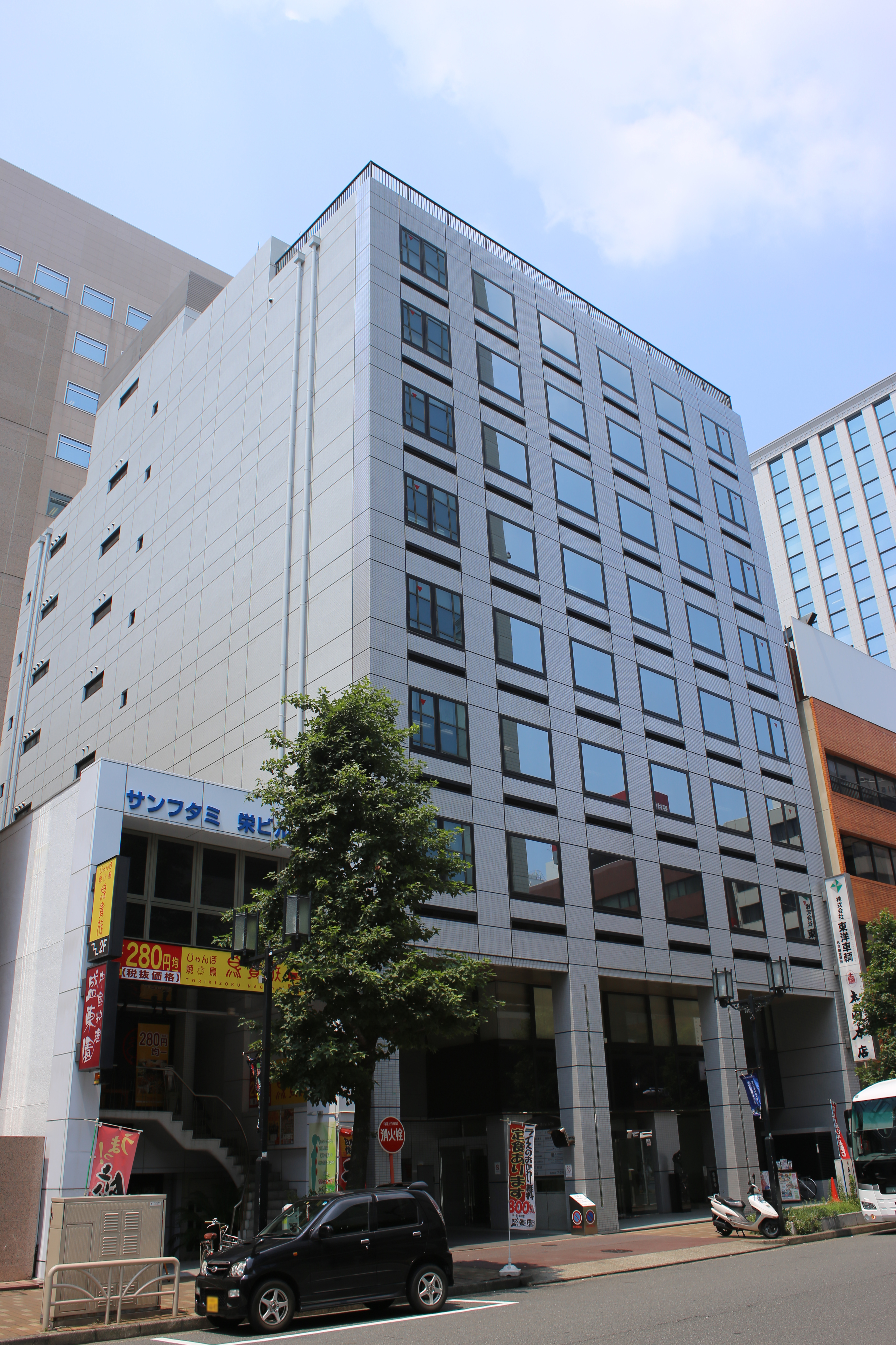 名古屋市中区栄二丁目のNUP伏見ビルを東側公道南側より撮影。ただし、ナンバープレートにつき画像処理済。